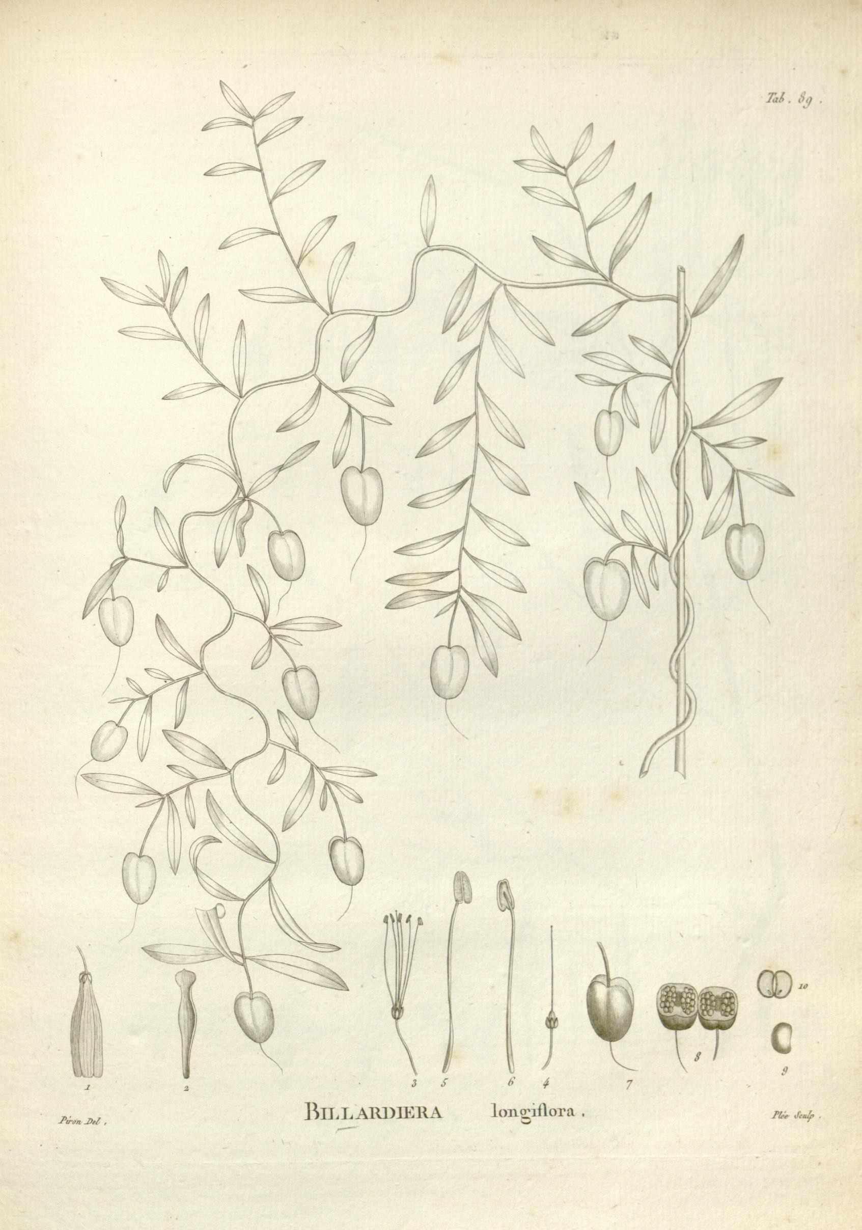 Novæ Hollandiæ plantarum specimen v.1